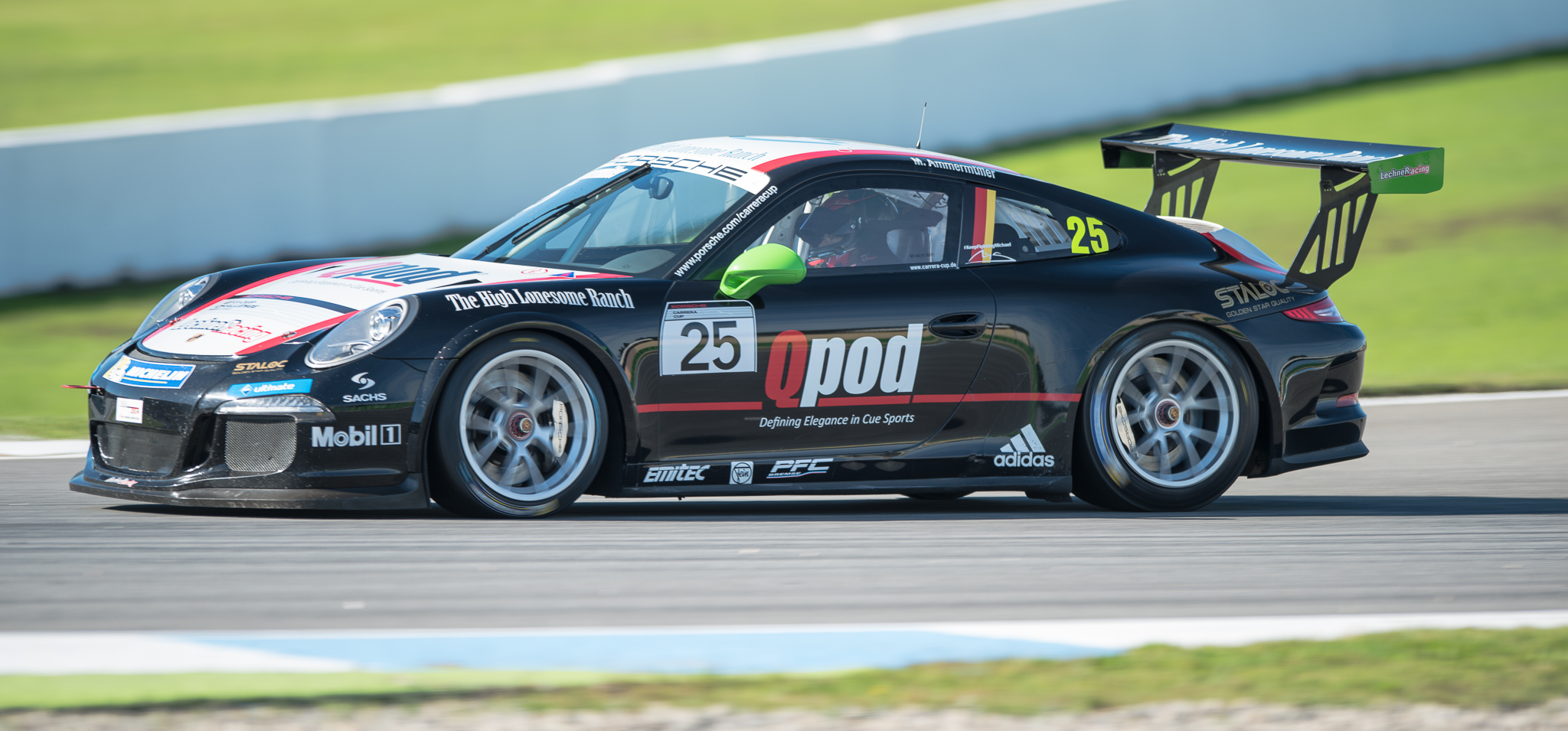 Hockenheimring,Michael Ammermüller,Motorsport,Porsche 911 GT3 Cup (Typ 991),Porsche Carrera Cup Deutschland,Walter Lechner Racing Team